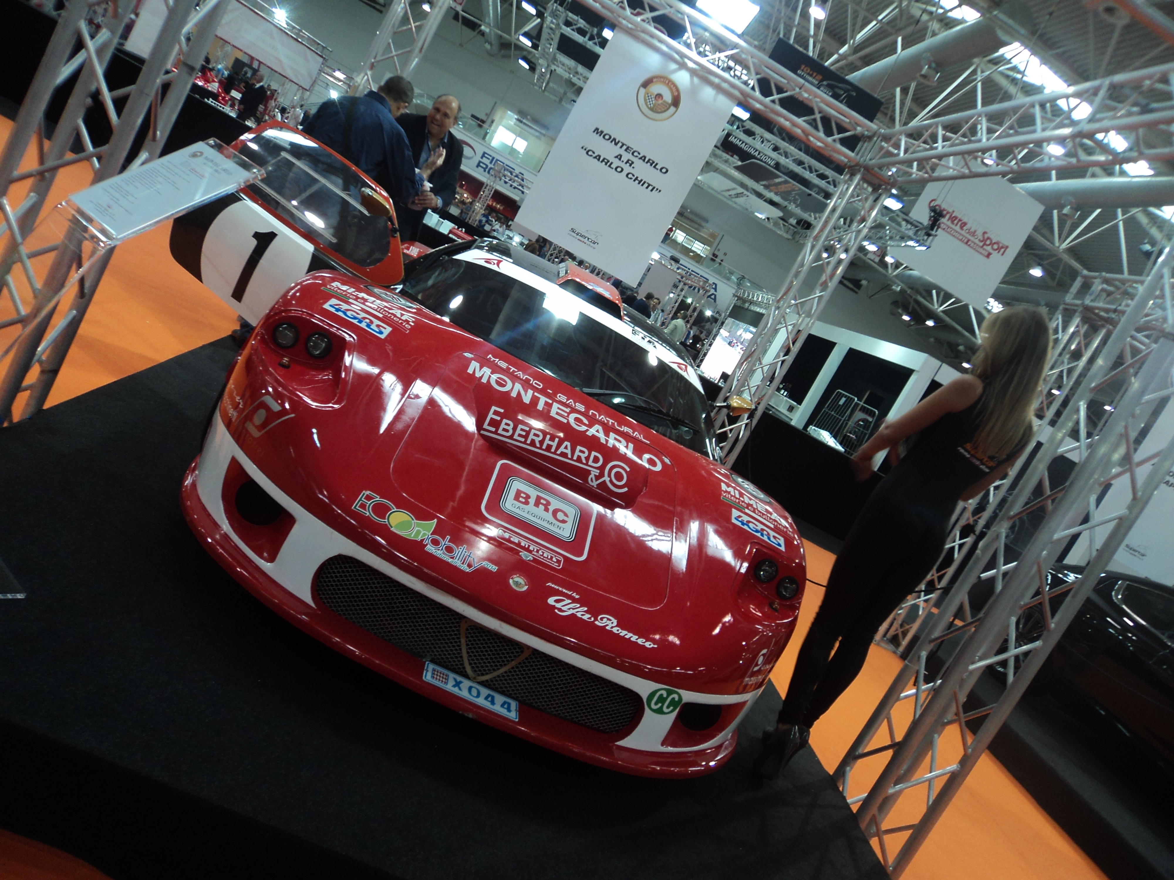 Supercar - Roma Auto Show